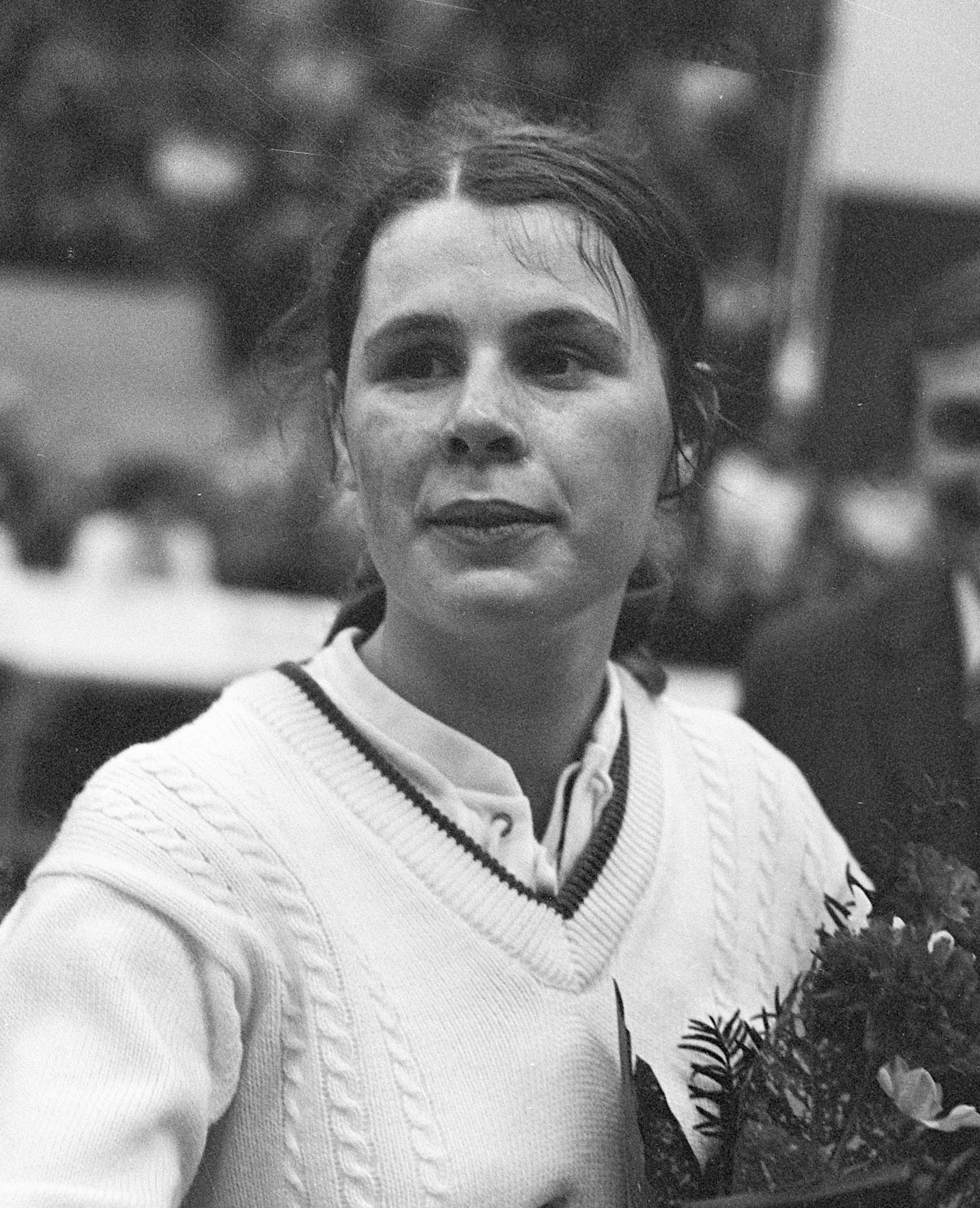 Internationale kampioenschappen Badminton te Beverwijk, Joke van Beusekom